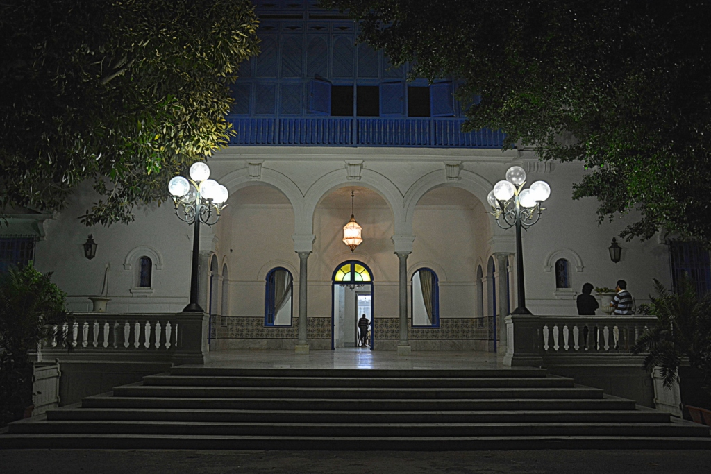 Partie historique dit « Kasr Essaâda » à La Marsa avec une zone de servitude étendue jusqu’à la clôture du palais conformément à l’article 45 du code du patrimoine, La Marsa